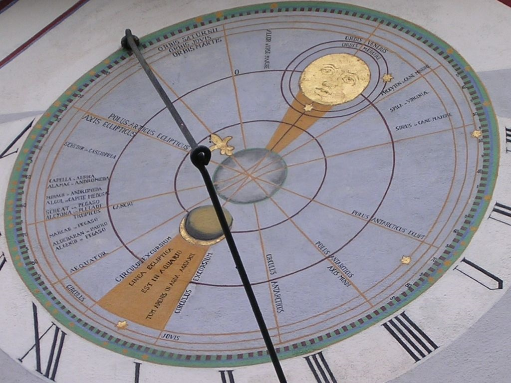 La Fresque astronomique du cadran solaire des Récollets de Rouffach